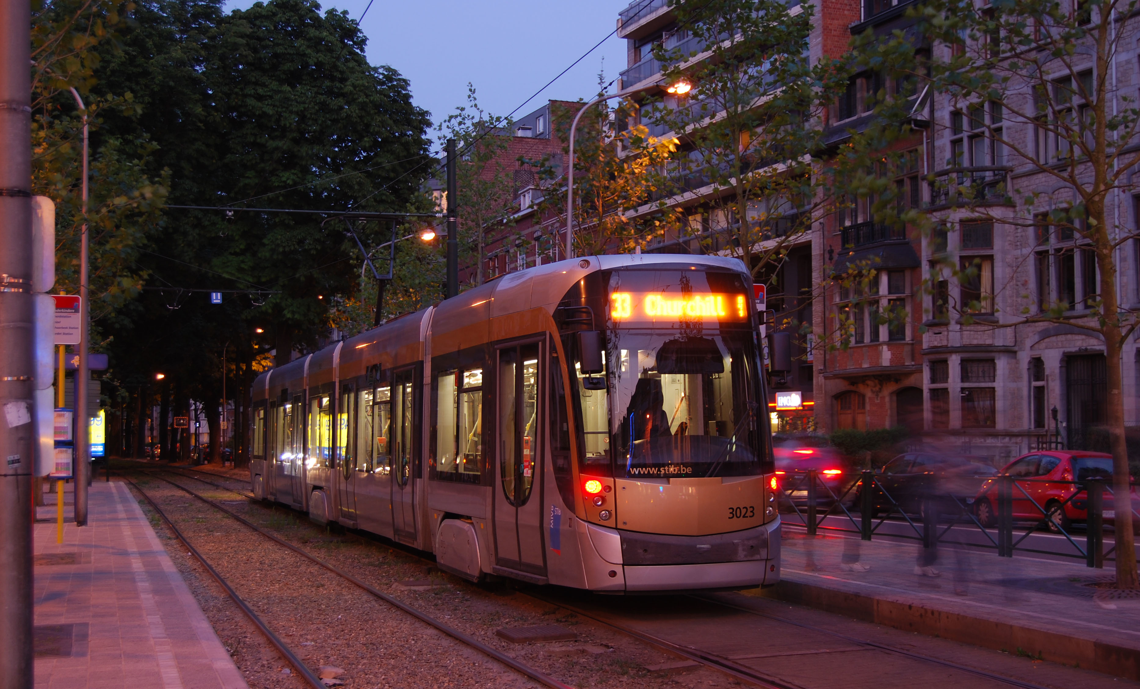 Ligne 33 à "Vanderkindere" avant d'arriver à son ancien terminus. Bruxelles.. Template:Enl1=Brussels tram route 33 at Vanderkindere before arriving at it's old terminus